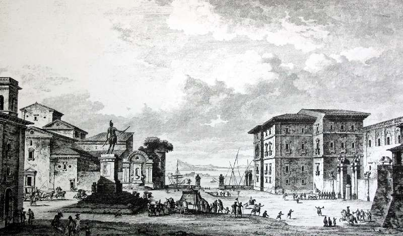 Francesco Sicuro, Piazza del Palazzo Reale a Messina. Incisione del sec. XVII.